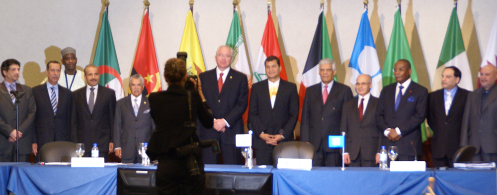 Swissotel, Quito-Ecuador 11 de diciembre de 2010